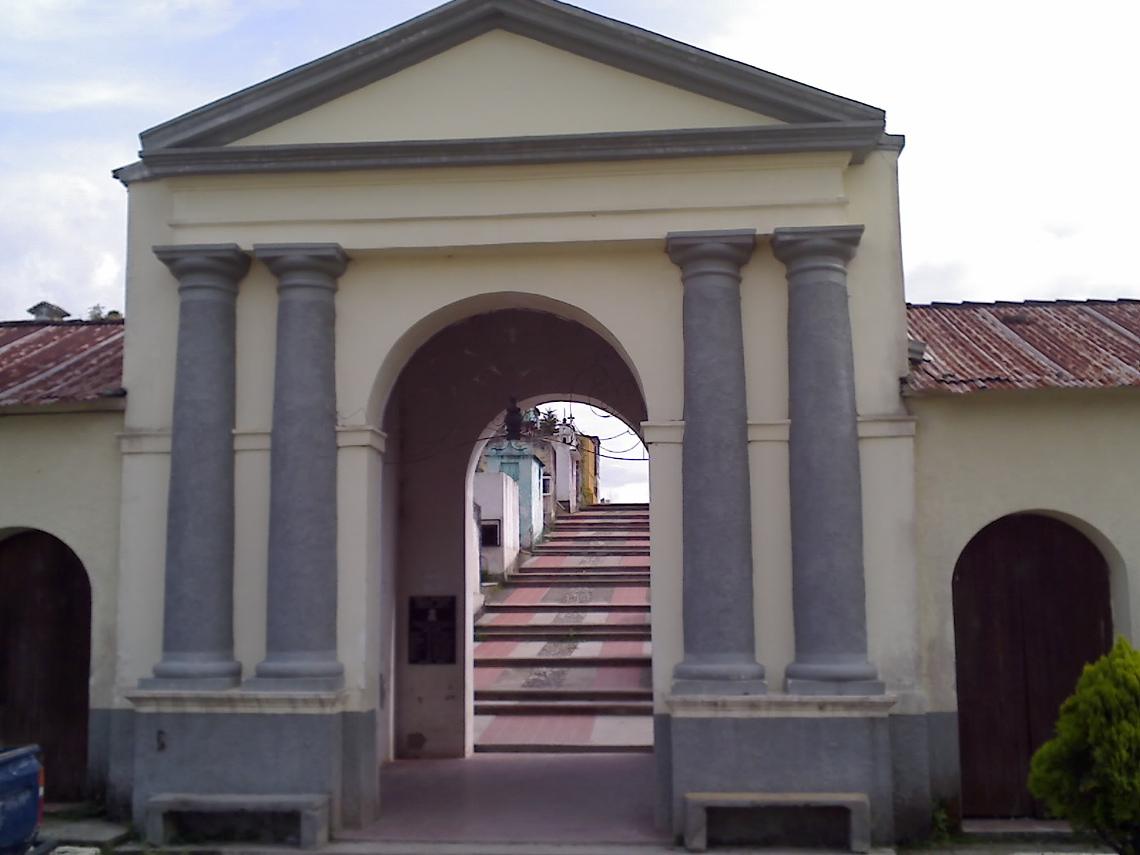 Fachada del Cementerio general de Santa Rosa de Copán, Honduras.